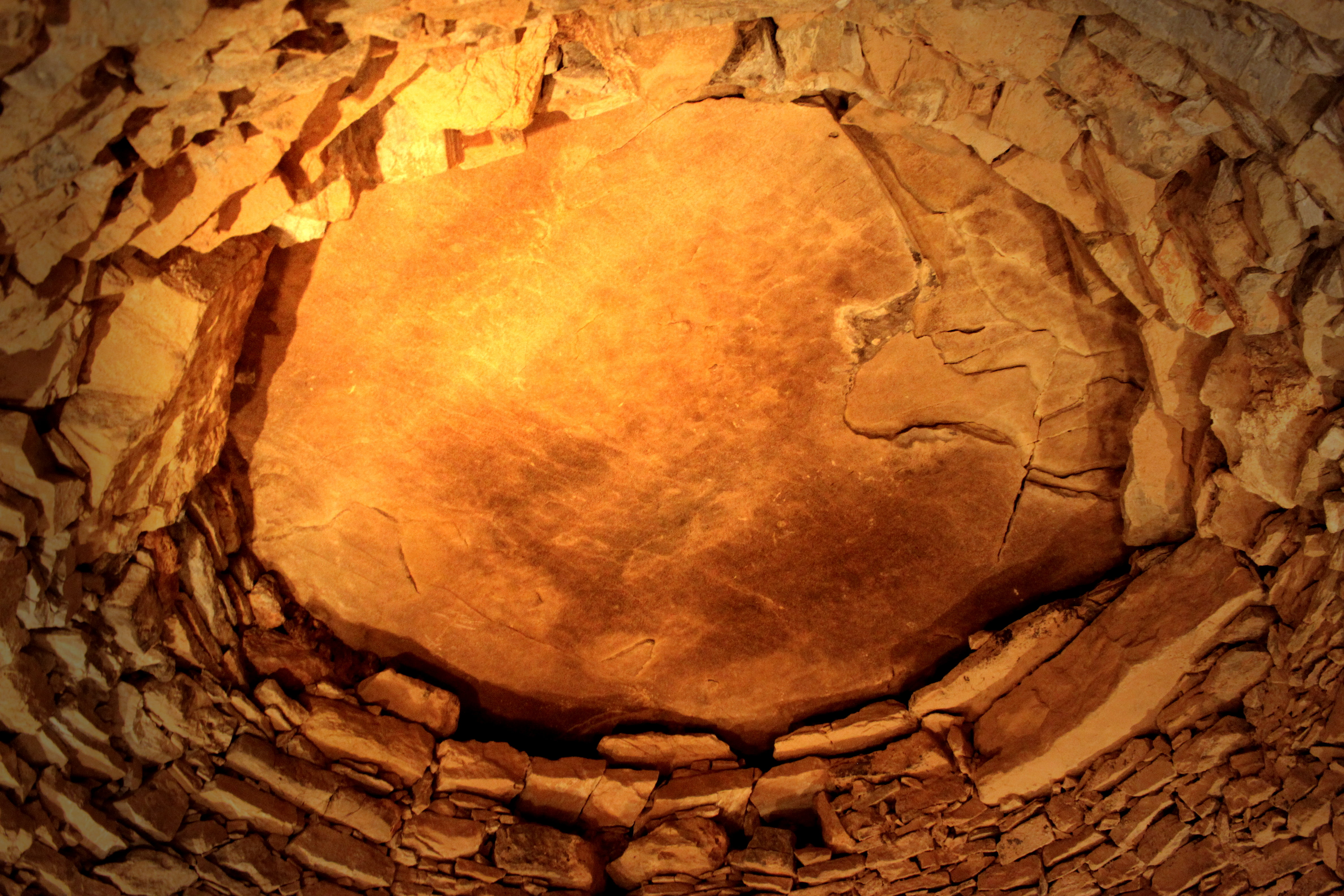 Dolmen Cueva del Romeral Antequera Málaga